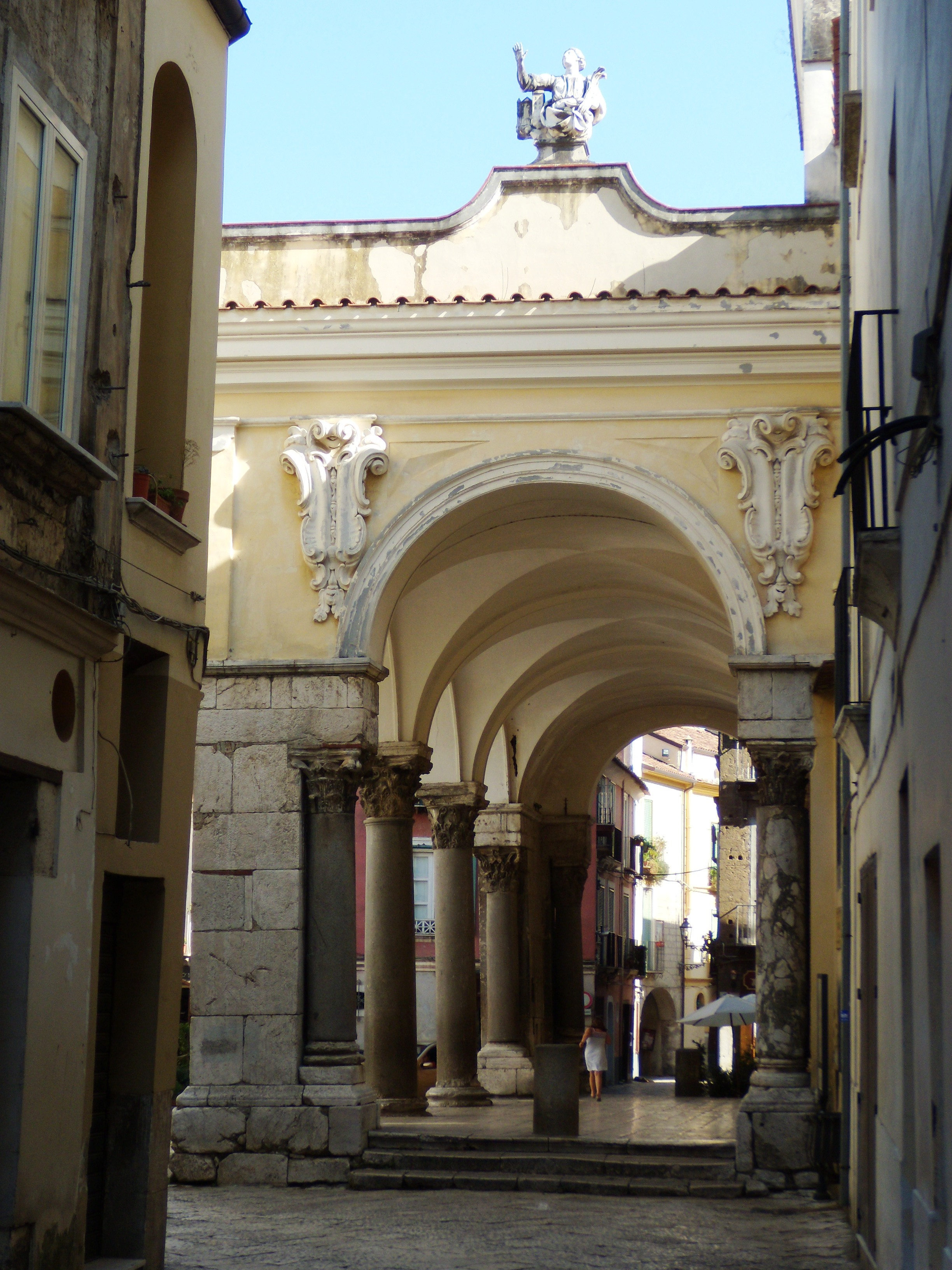 L'esterno del Duomo di Sant'Agata de' Goti (Italia)